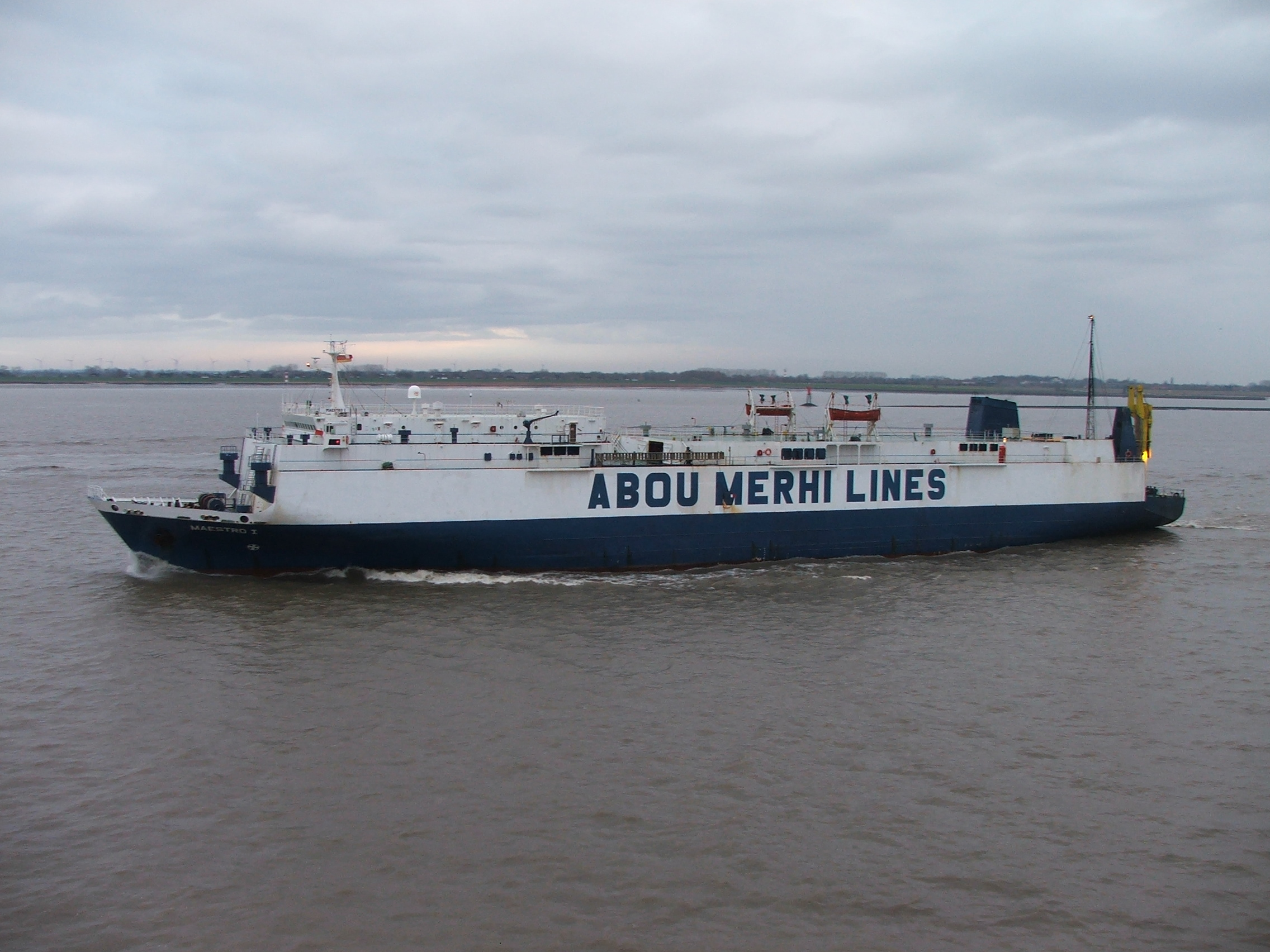 RoRo-Frachter Maestro I der libanesischen Reederei Abou Merhi, die Elbe einkommend. IMO Number: 7920857 MMSI Number: 354134000 Callsign: 3EMY5 Length: 120 m Beam: 20 m